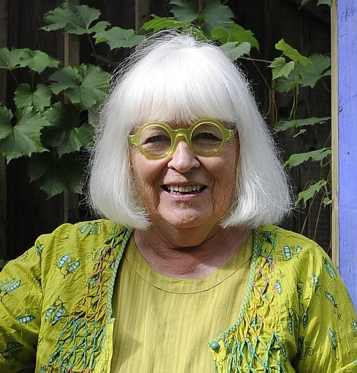 I ateljén hos Gudrun Sjödén norr om Stockholm.